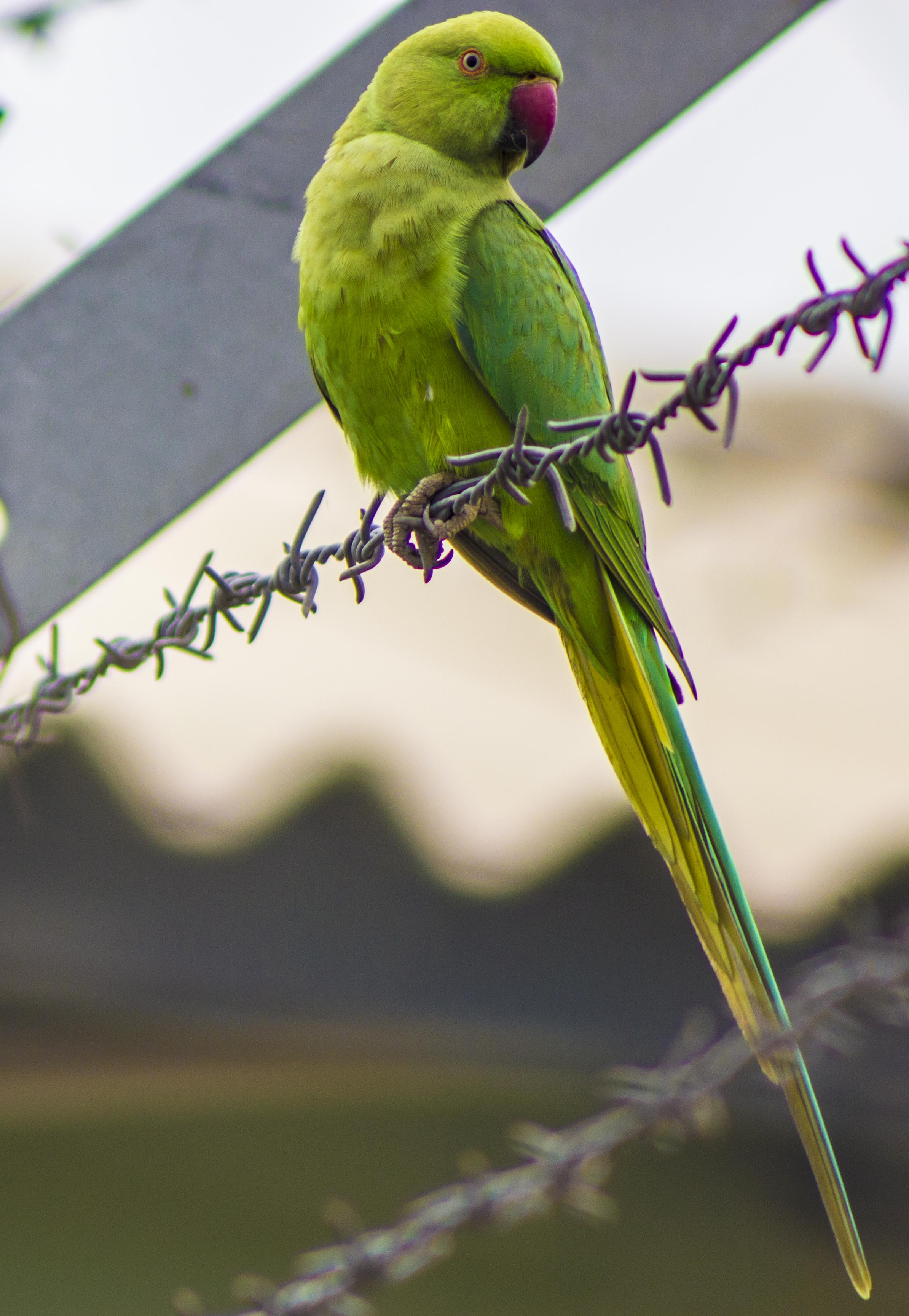 Parrot..